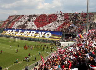 Coreografia curva sud durante Salernitana-Pescara del 27 aprile 2008